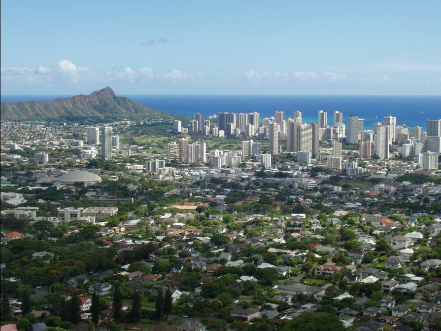 Honolulu mit Blick auf den Pazifik